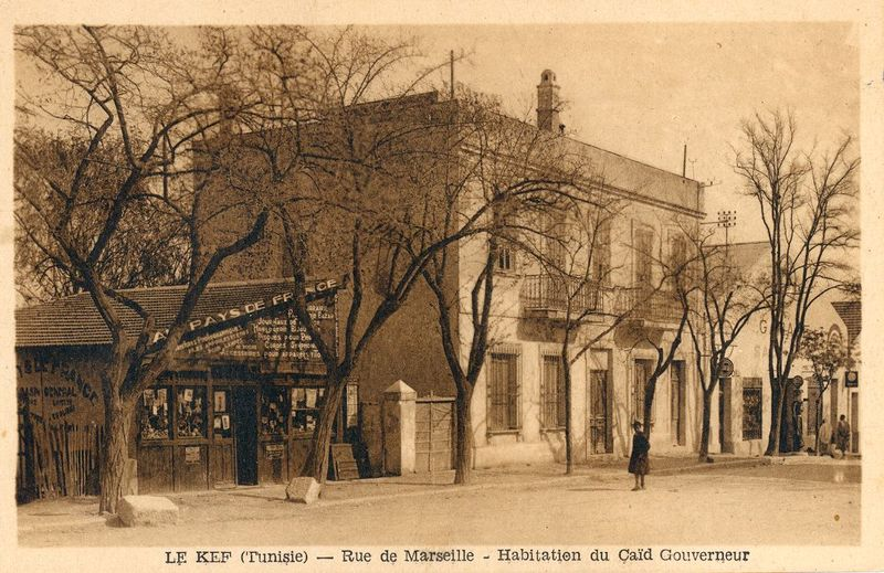 Habitation du caïd du Kef en Tunisie